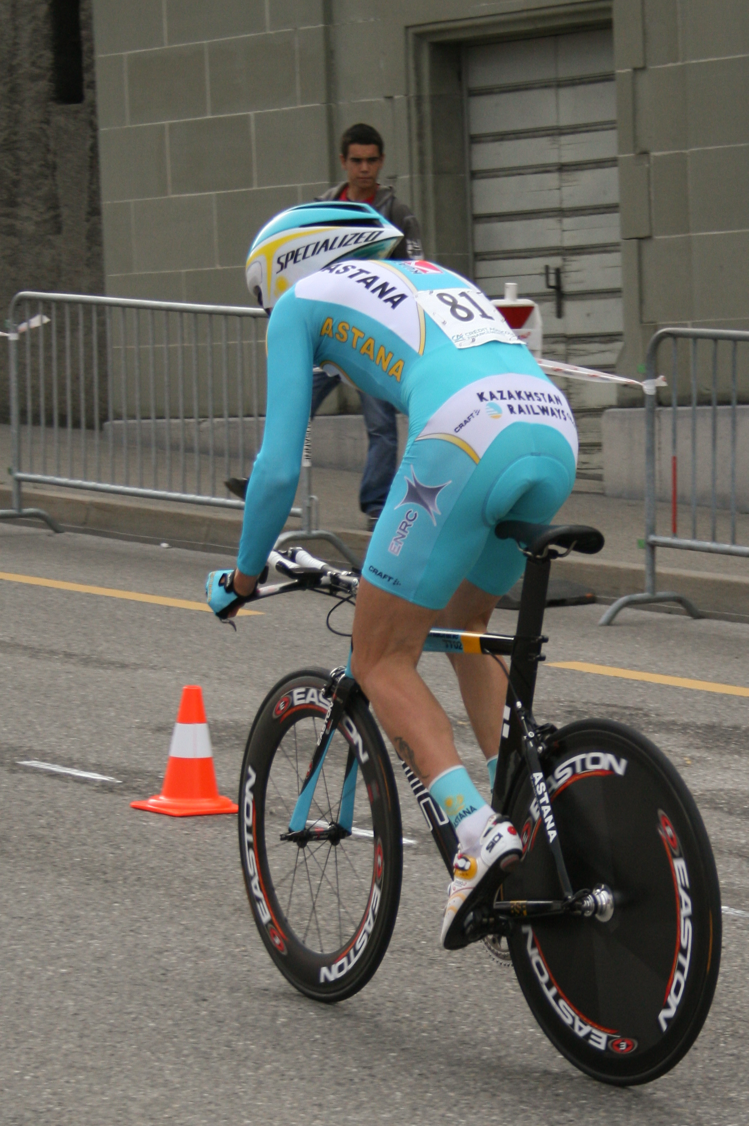 Igor Abakoumov prologue du Tour de Romandie 2007